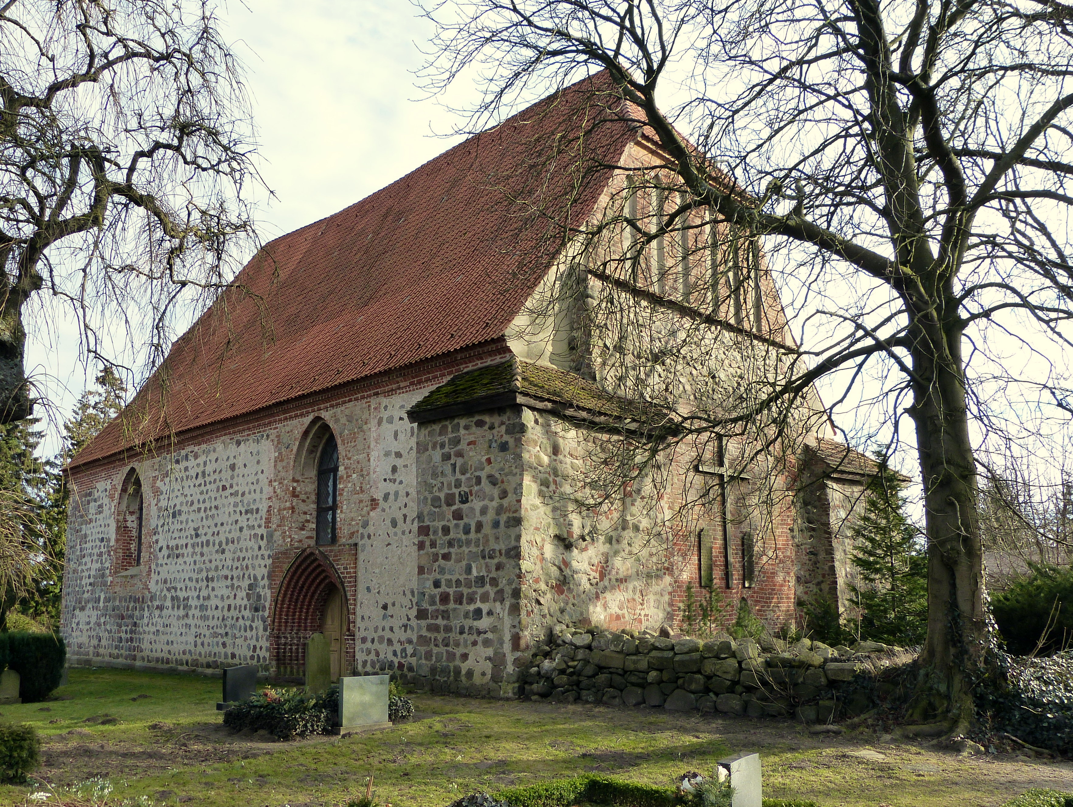 Kirche in Hohenmocker, Ansicht von Nordwesten